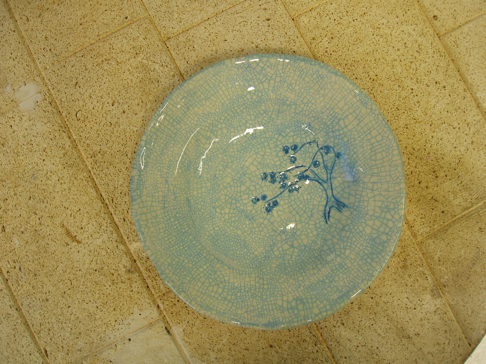 Krakleevõrgustik.